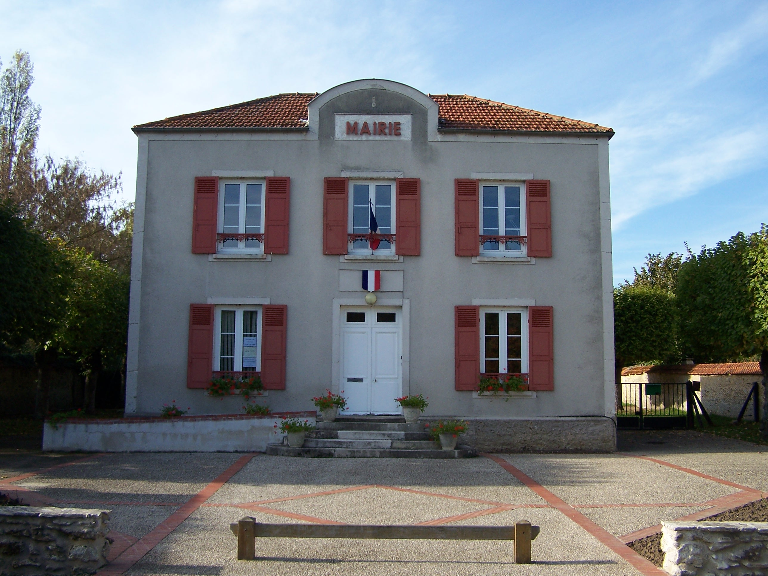 Mairie de Mareil-le-Guyon (Yvelines, France)